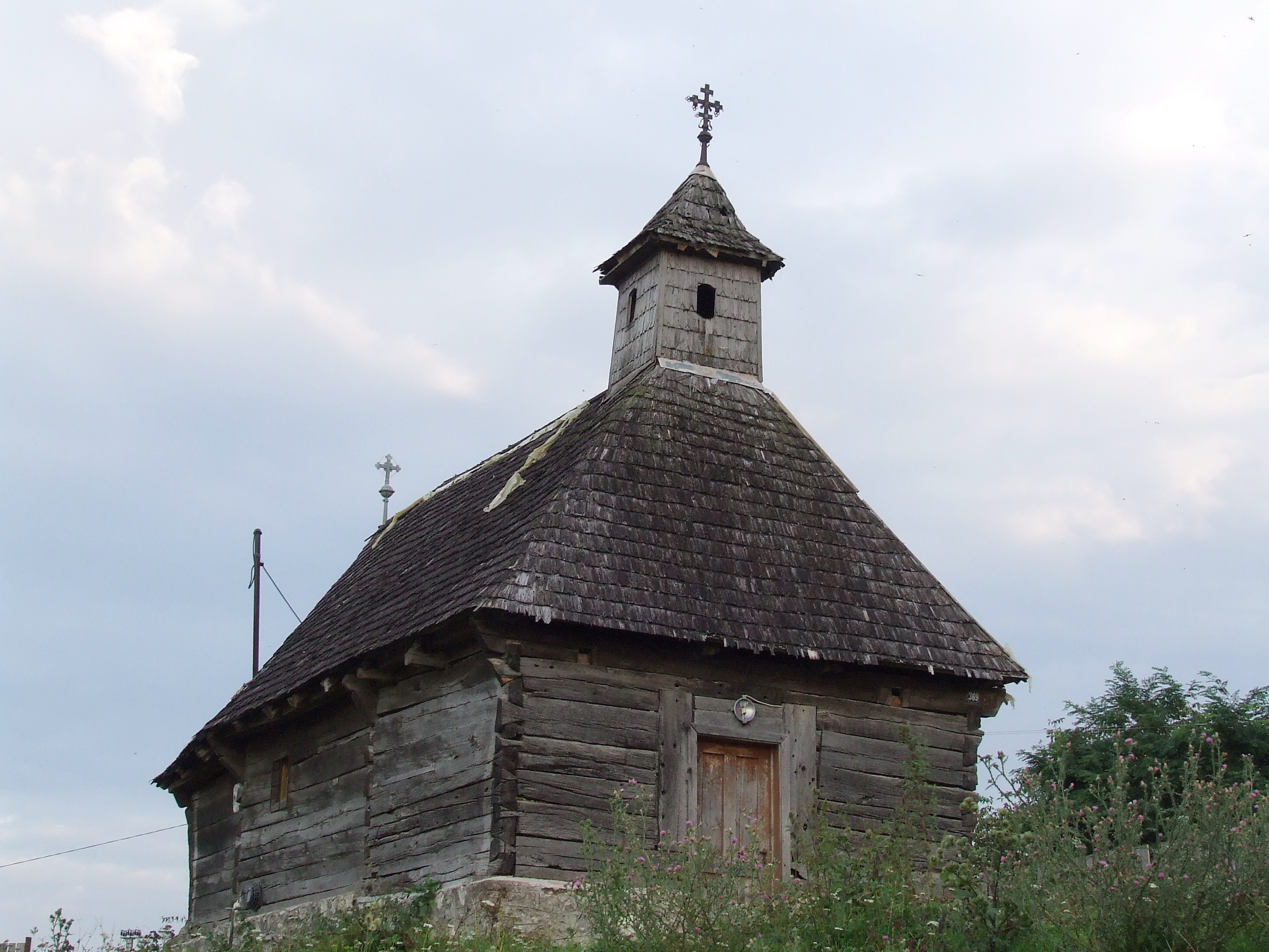 Biserica de lemn din Cuciulata, județul Brașov.